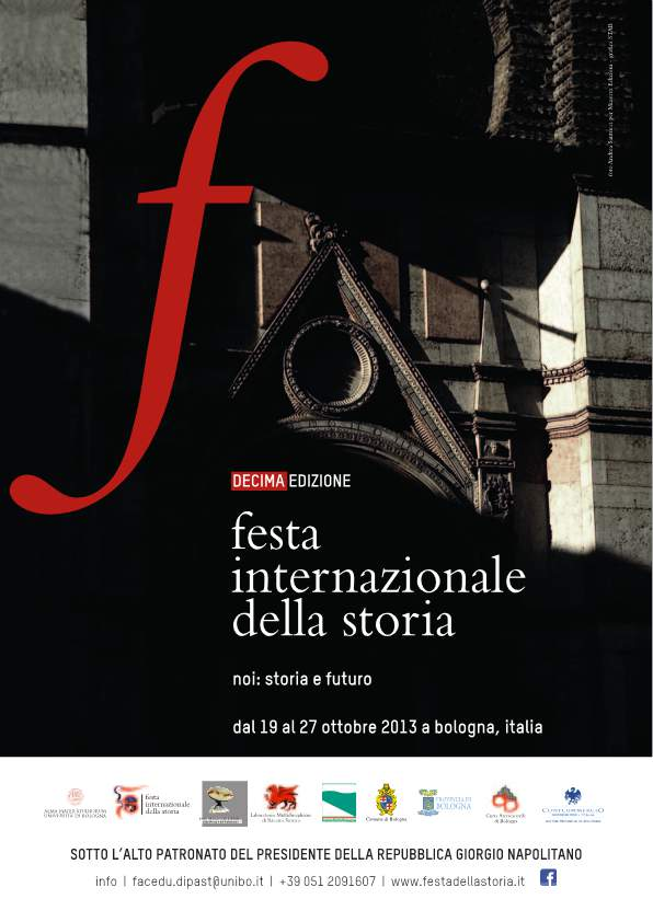 Locandina della Festa Internazionale della Storia di Bologna edita da Andrea Santucci per Minerva edizioni